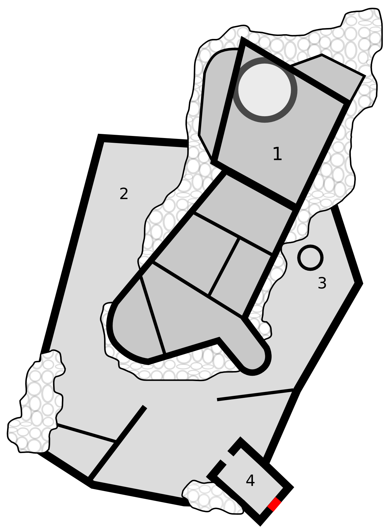 Plan zamku w Bobolicach, autor: VindicatoR Zamek górny (basteja, wieża, dom mieszkalny) Podzamcze (dziedziniec, zrekonstruowany obecnie mur obwodowy) Studnia Brama wjazdowa (zrekonstruowana)